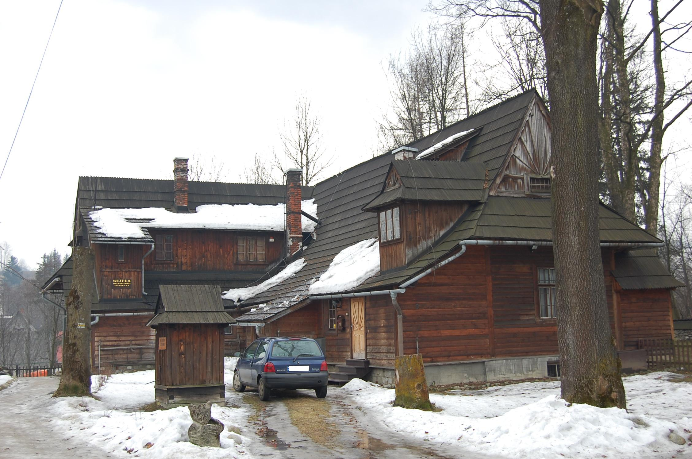 Willa Harenda w Zakopanem